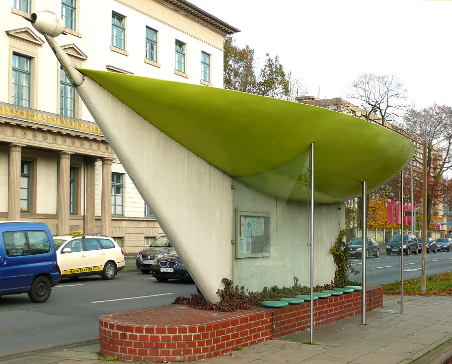 Busstops